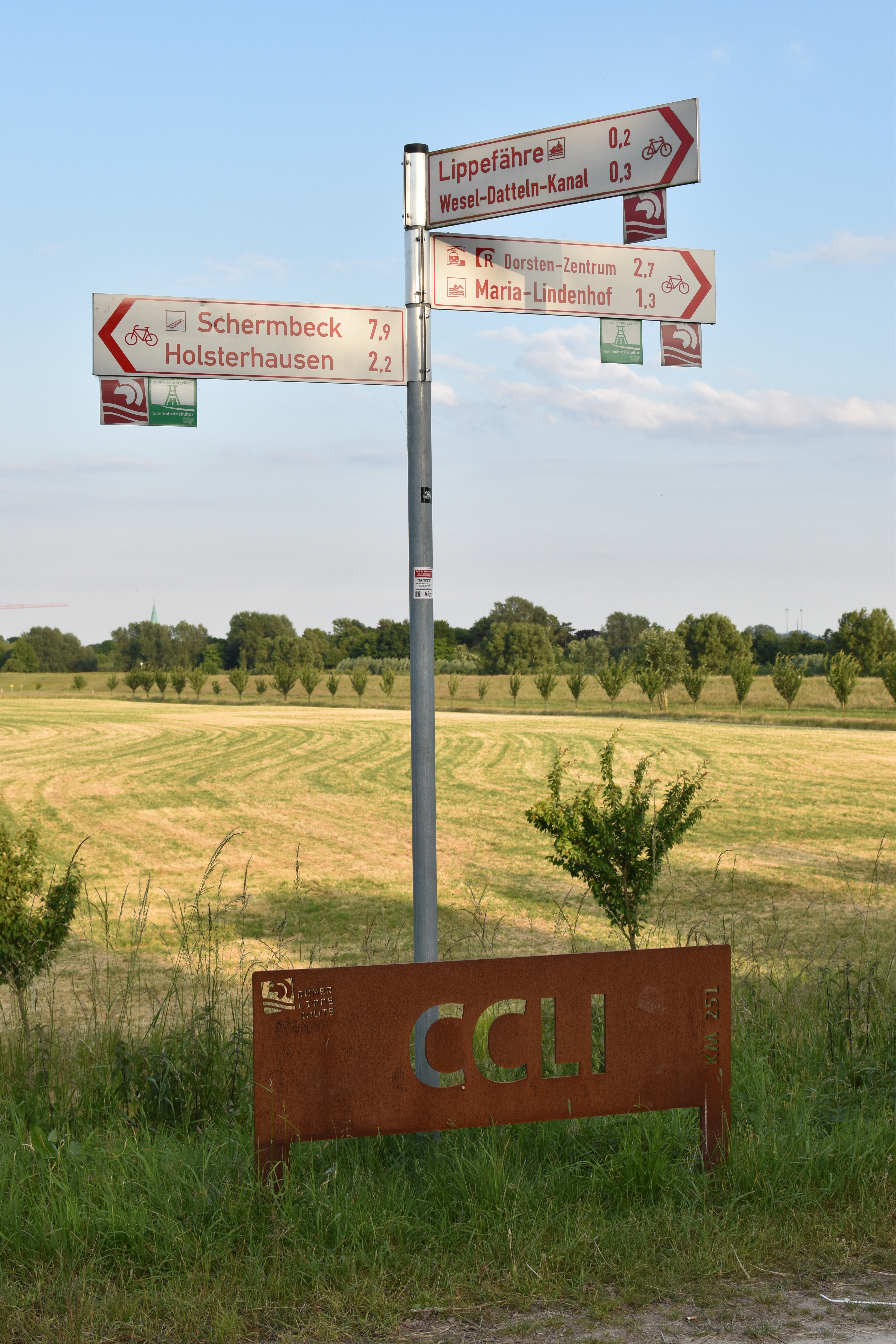 Beschilderung der Römer-Lippe-Route Kilometer 251 Dorsten 2015-06-10